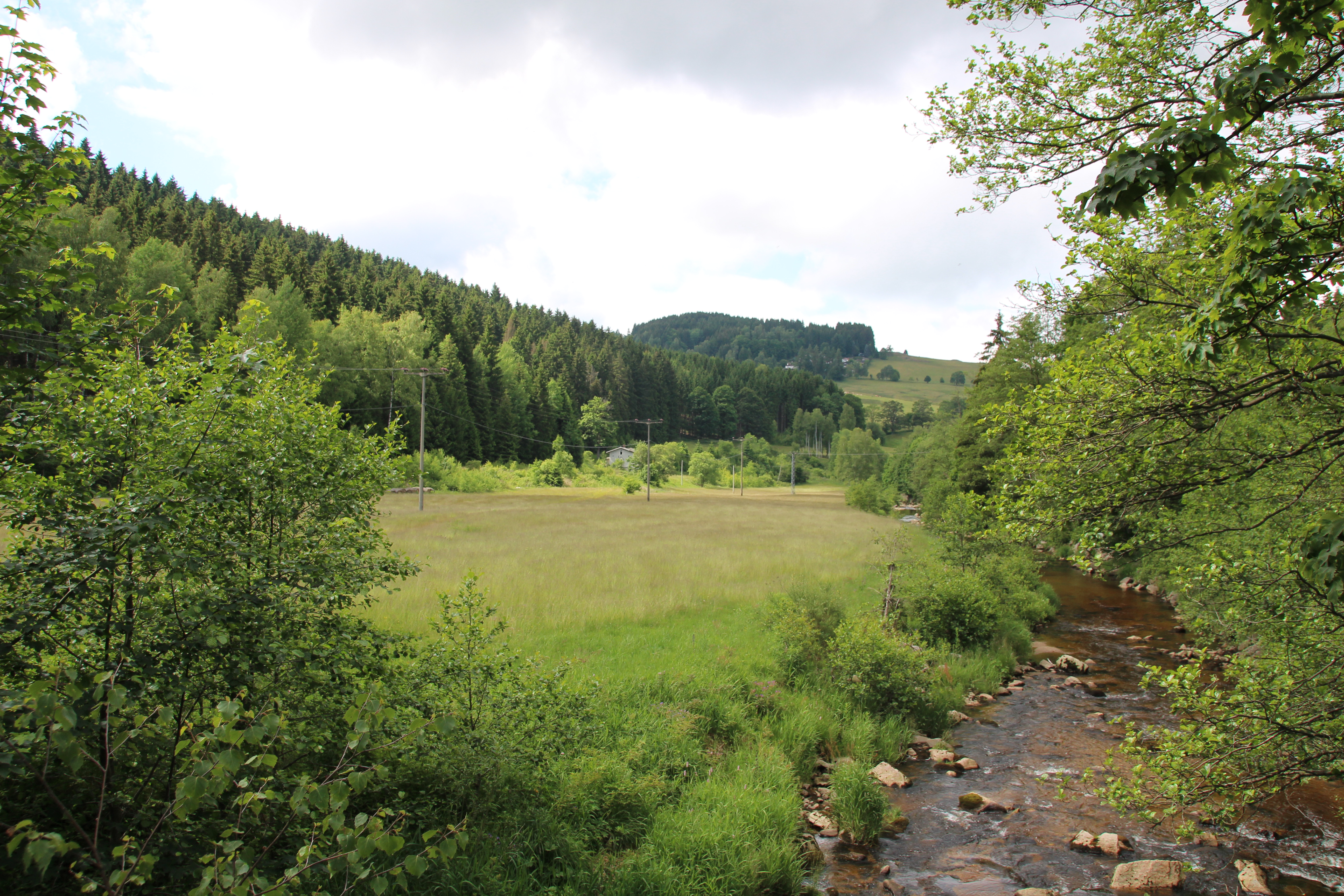 Das Tal der Zwickauer Mulde mit der früher zum Uttmannschen Vorwerk gehörenden „Herrenwiese“ im Bereich des „Forsthauses an der Mulde“ in Schönheide. Im linken Bereich liegen die Gleise der früheren Bahnverbindung von Schönheiderhammer (rechts außerhalb ) in Richtung Wilzschhaus mit der Bahnstation Schönheide Süd als Teil der Bahnstrecke Chemnitz–Adorf. Ein Bahnwärterhaus im typischen Stil der Bahnbauten der späten zweiten Hälfte des 19. Jahrhunderts ist deutlich zu erkennen. Im Hintergrund ist die Südseite des Berges „Knock“ (525,5 Meter) im Gemeindegebiet von Schönheide zu sehen, der teilweise bewaldet ist. Dessen rechter unbewaldeter Teil gehört zum FFH-Gebiet Bergwiesen um Schönheide und Stützengrün